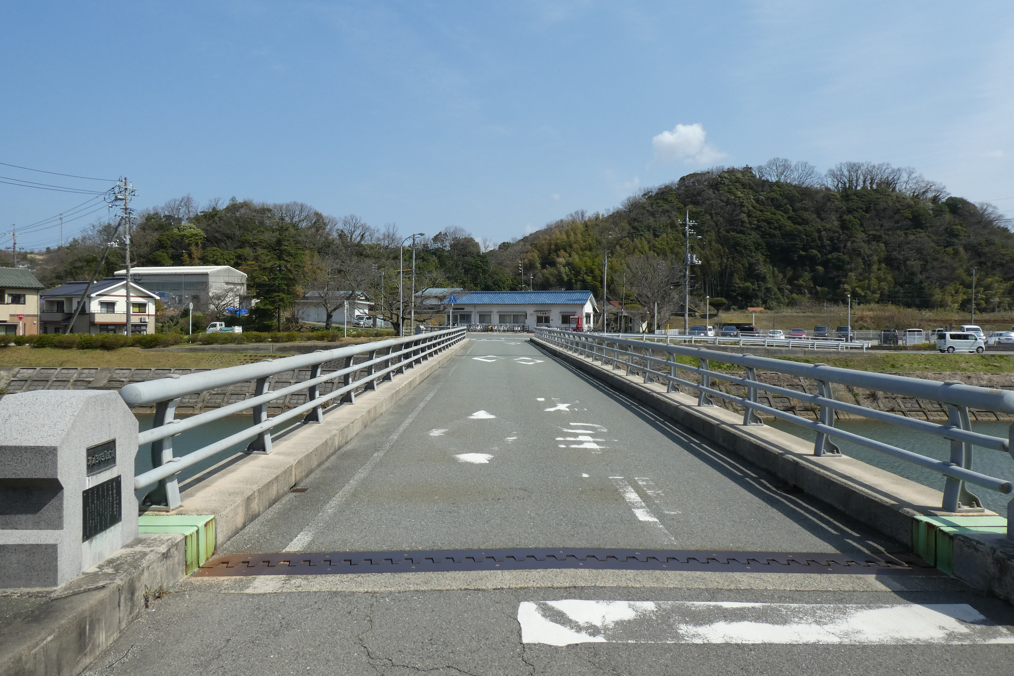 島根県道207号下府停車場線。国道9号交点から下府駅に向けて撮影。